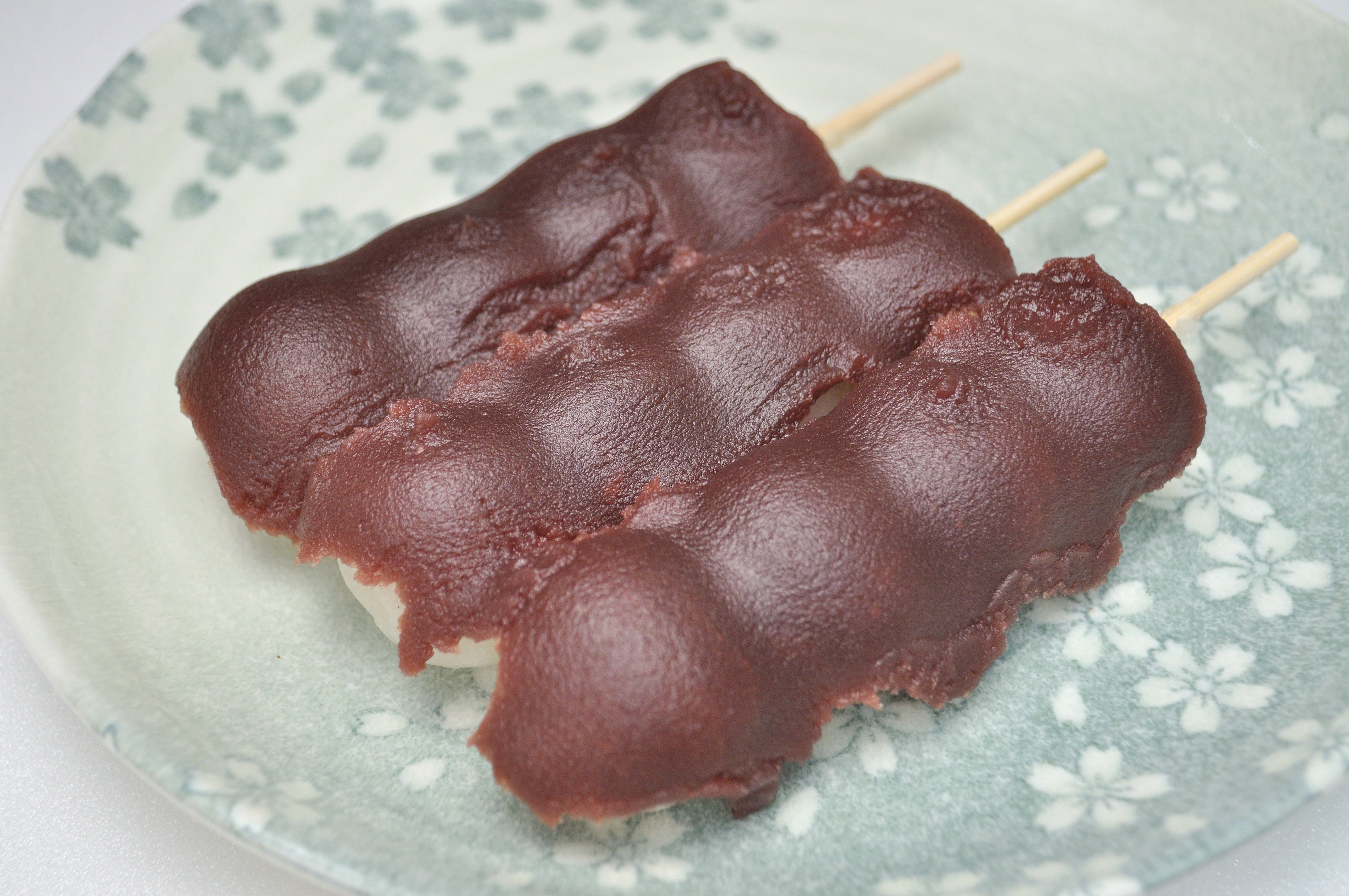 あんだんご